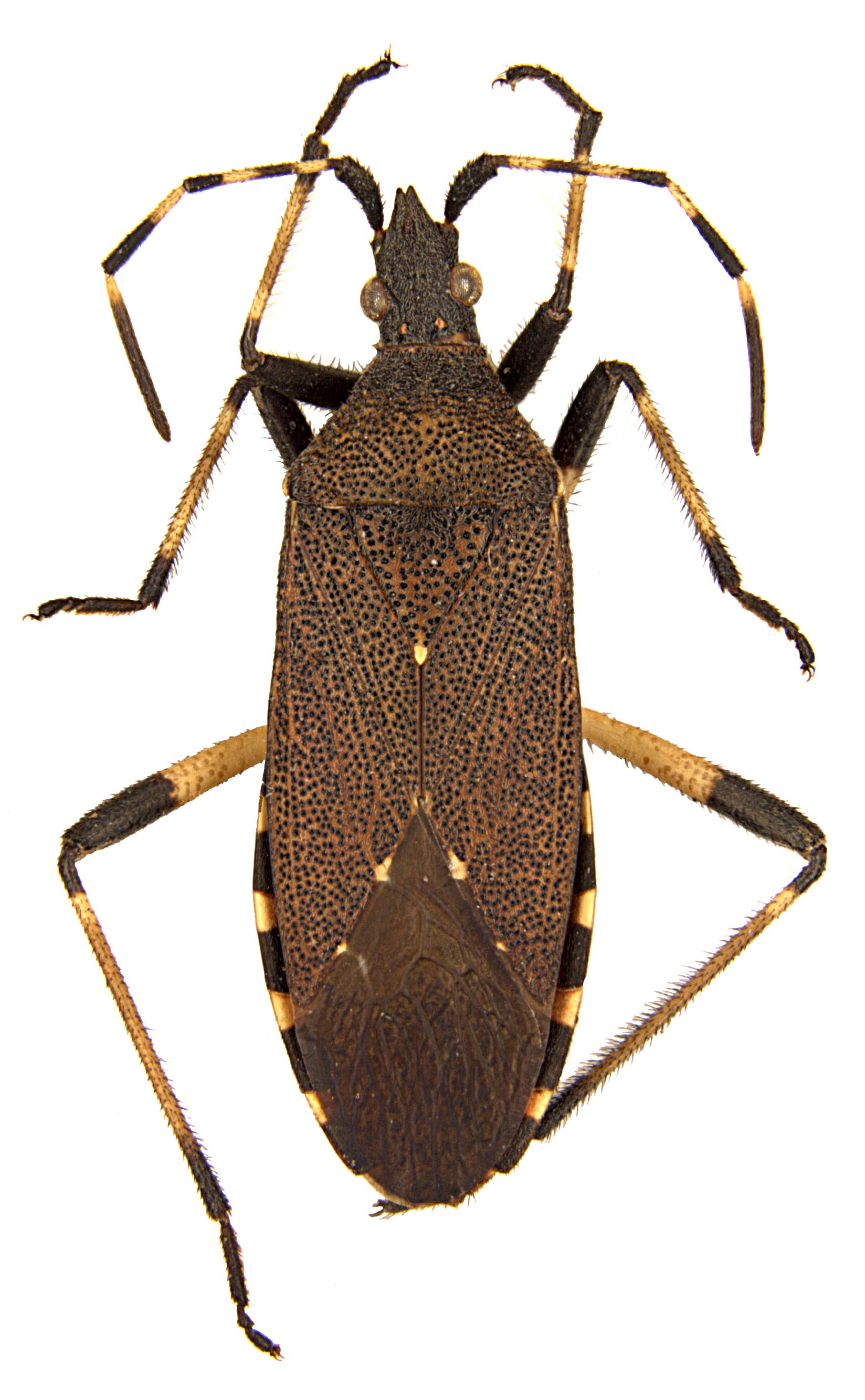 Dicranocephalus agilis, Habitus, specimen in Zoologische Staatssammlung München, Foto: Marianne Müller